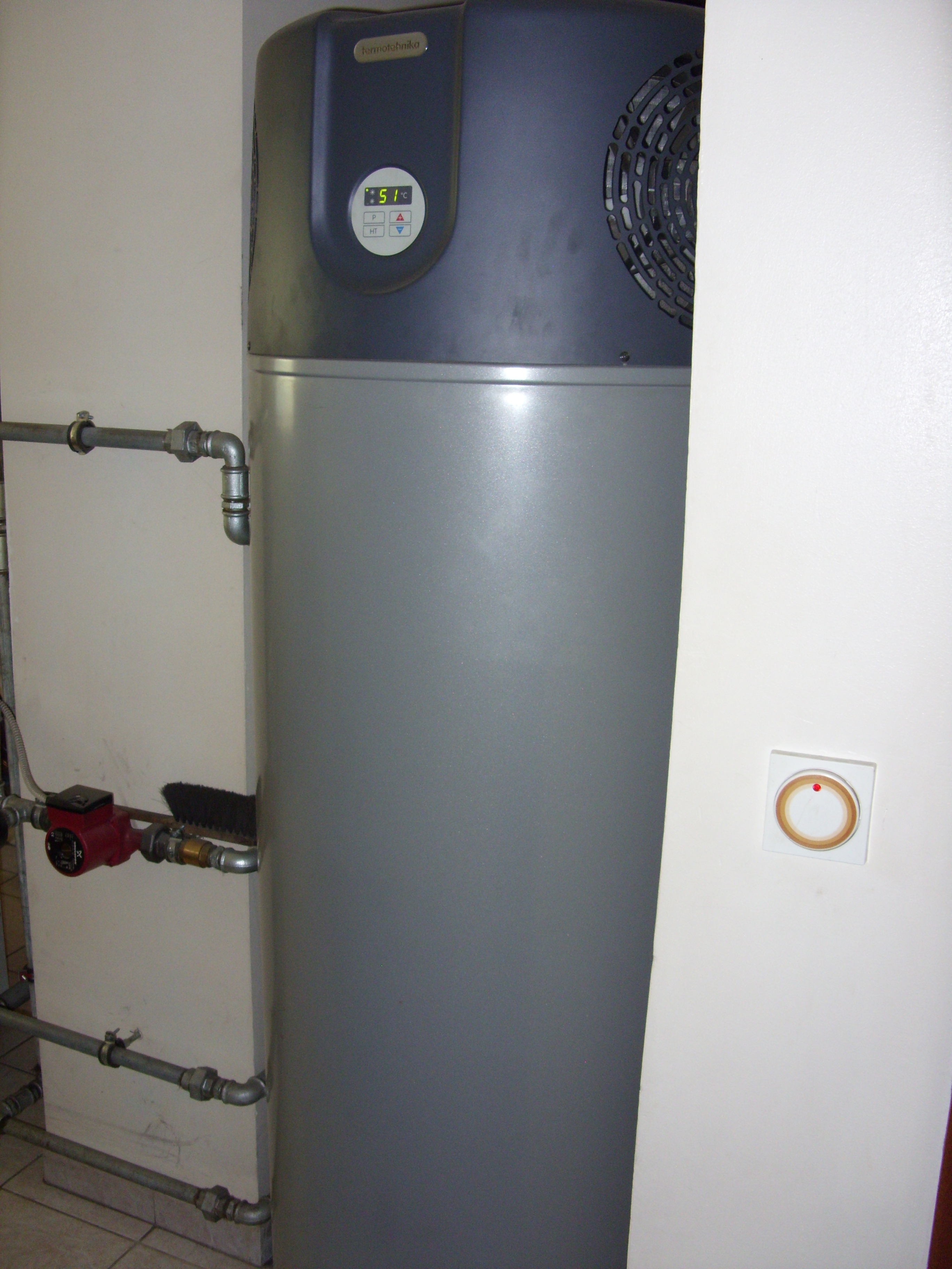 Na sliki je prikazana toplotna črpalka, ki je priklopljena na elektriko ter z vsemi vhodnimi in izhodnimi cevmi za vodo in je pripravljena za uporabo.